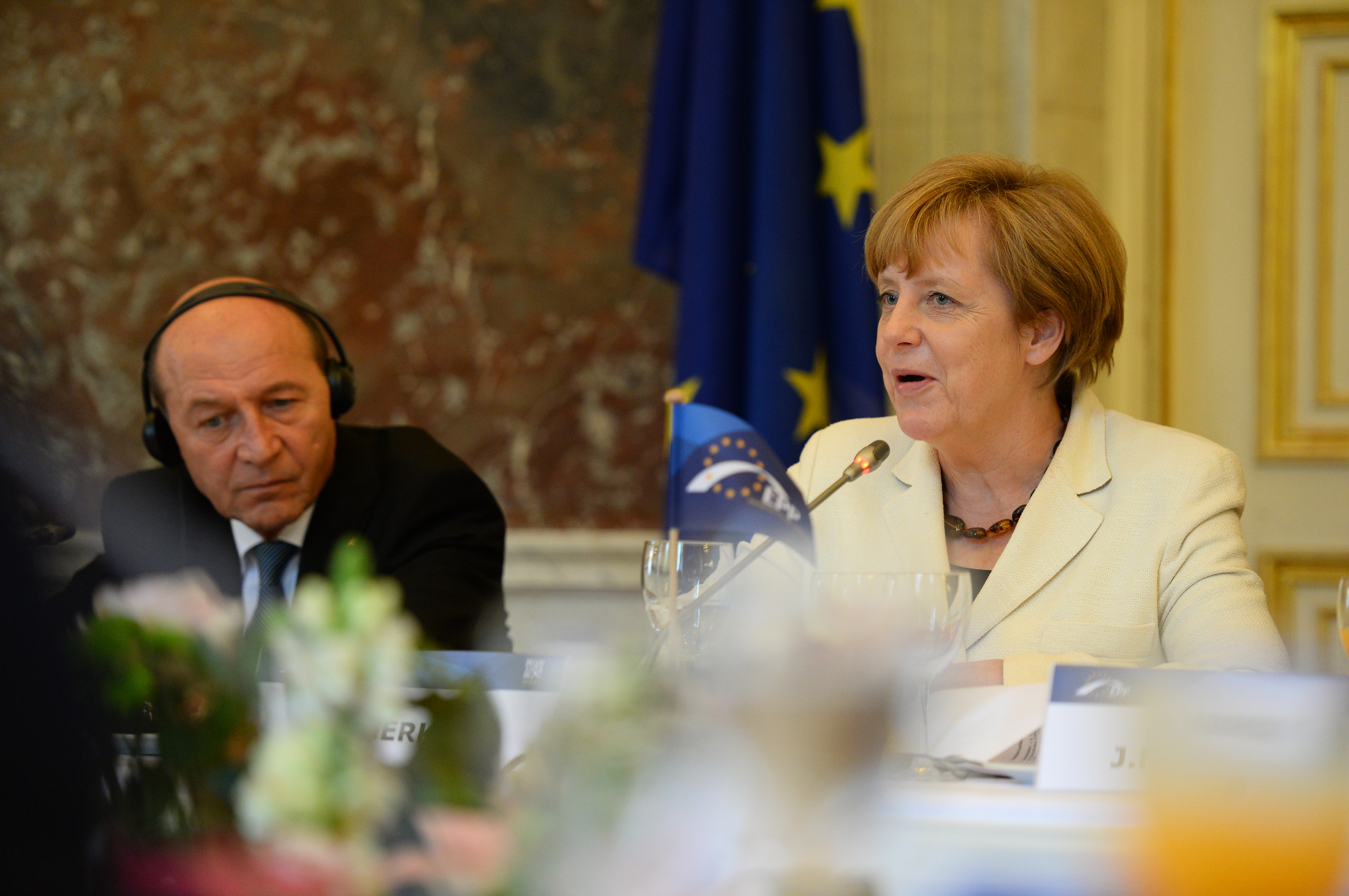 EPP Summit, Brussels, May 2014